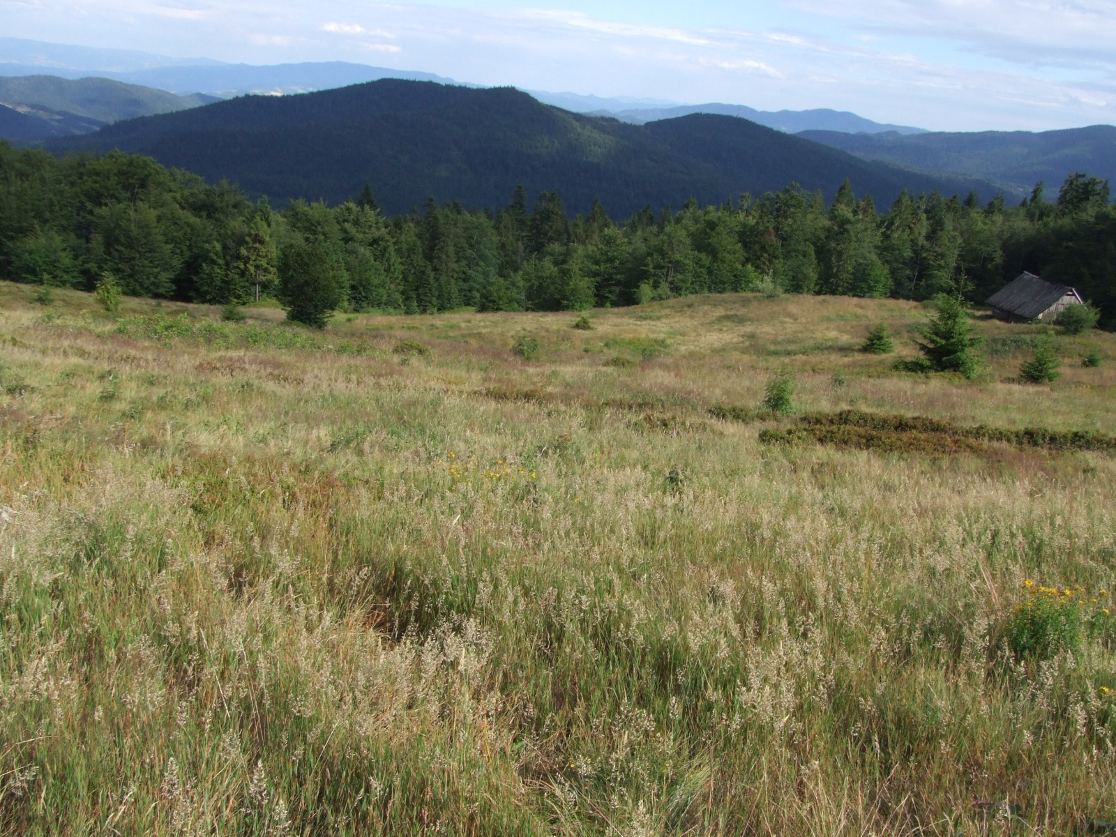 Widok z polany Skalne (Jasień, Beskid Wyspowy). Na środku Wielki Wierch i Kiczora Kamienicka